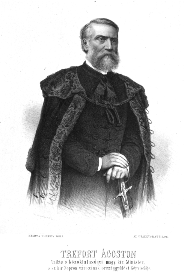 Trefort, Augustin (1817 - 1888) Abgeordneter, Politik, Politiker, Porträt